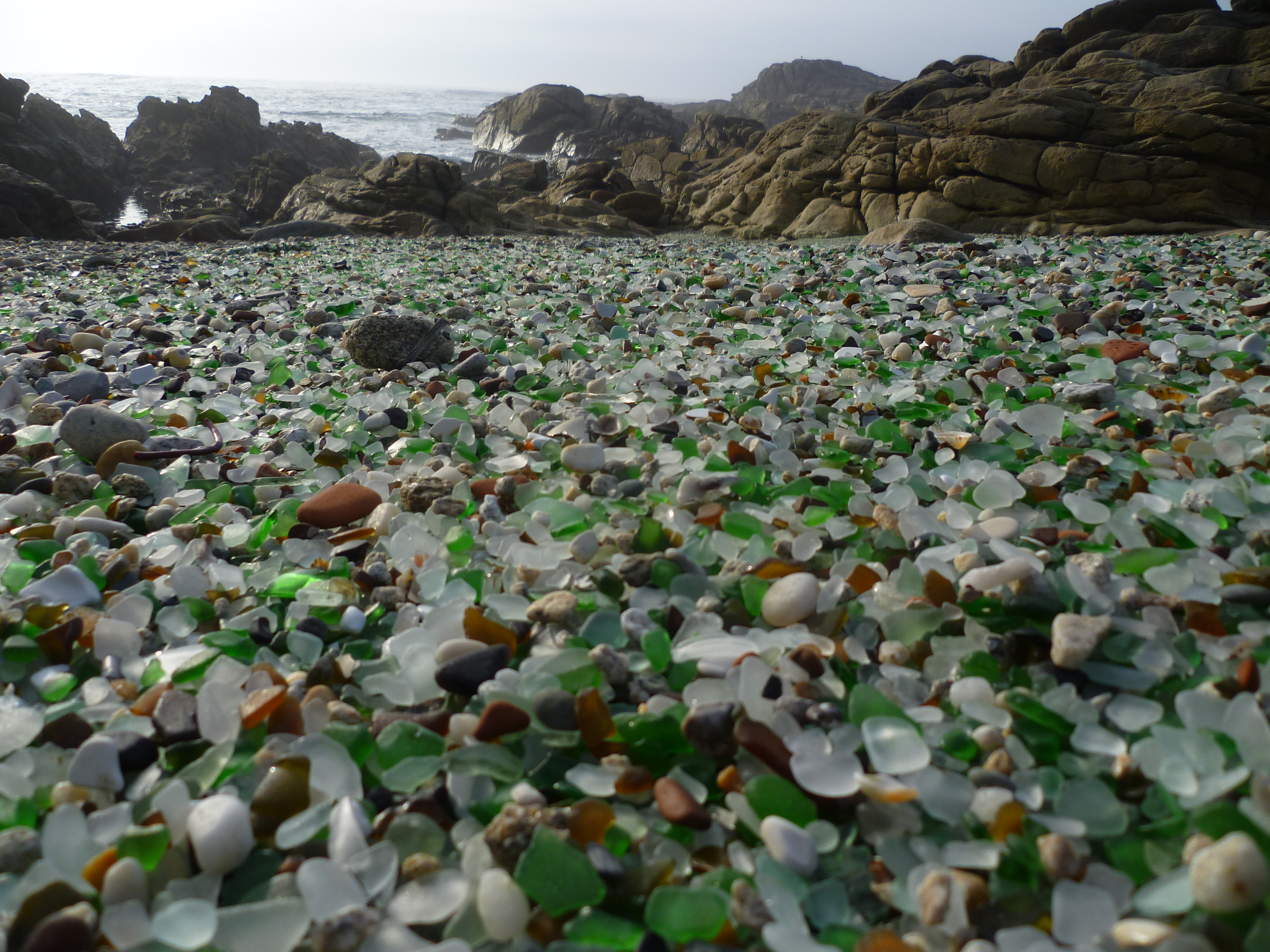 Costa da Morte This is a photography of a Special Area of Conservation in Spain with the ID: ES1110005. Natura2000 entry, EEA entry